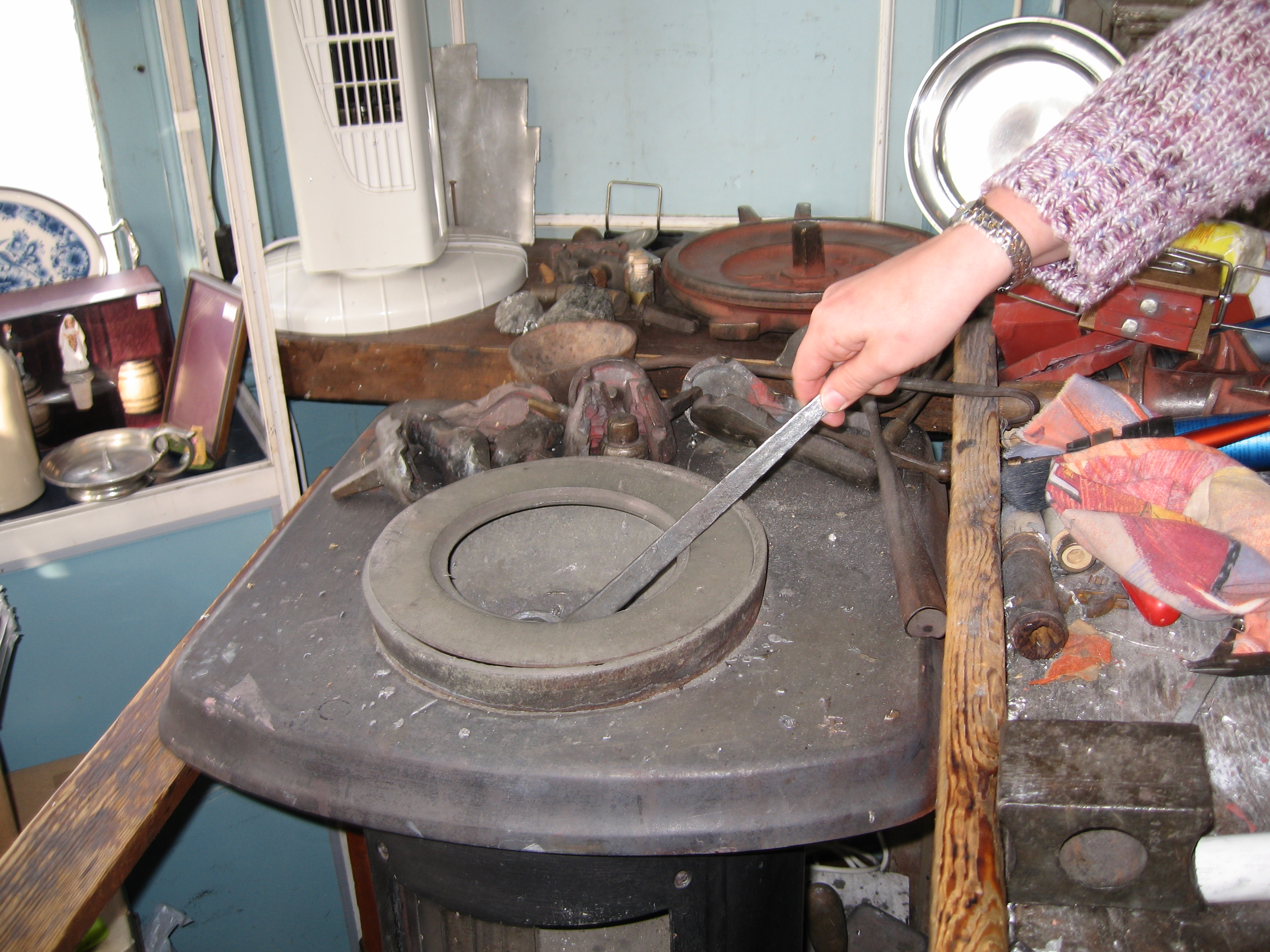 Tingieten. Met een lepel wordt de tin uit de smeltpot gehaald. Foto gemaakt door User:Ellywa op 23 februari 2007 in de Tinkoepel aan de Zaanse Schans, Zaandam. Met dank aan mw. I.J. Blaauboer, Melting pot with fluid tin. Picture by User:Ellywa on February 23, 2007, in the Tinkoepel in Zaandam, The Netherlands. With thanks to mrs. I.J. Blaauboer